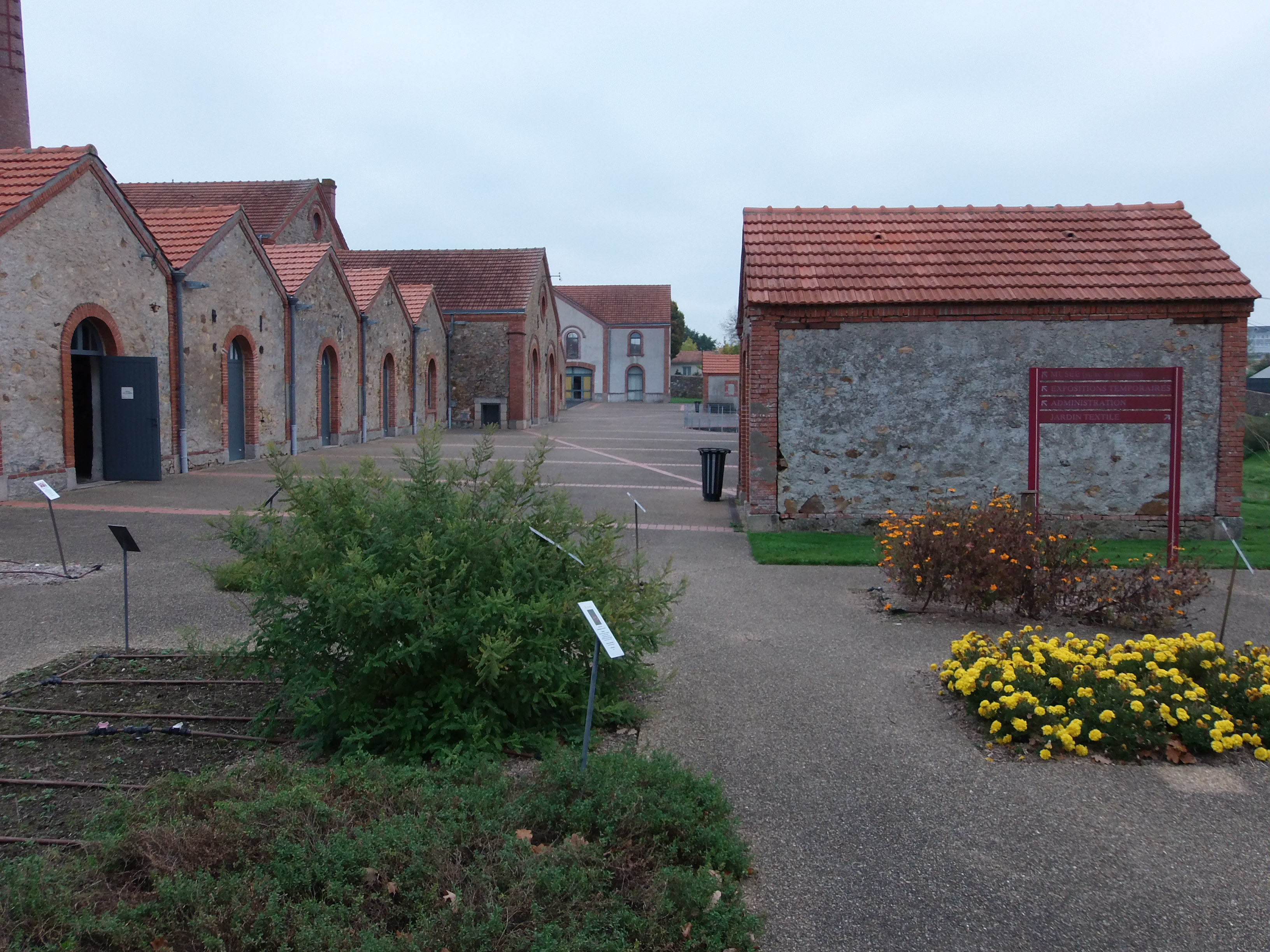 Vue extérieure du musée du textile et de la mode de Cholet (Maine-et-Loire, France), avec aperçu du jardin de plantes textiles et de plantes tinctoriales. L'établissement se trouve dans l'ancienne blanchisserie de la rivière Sauvageau. Octobre 2015.